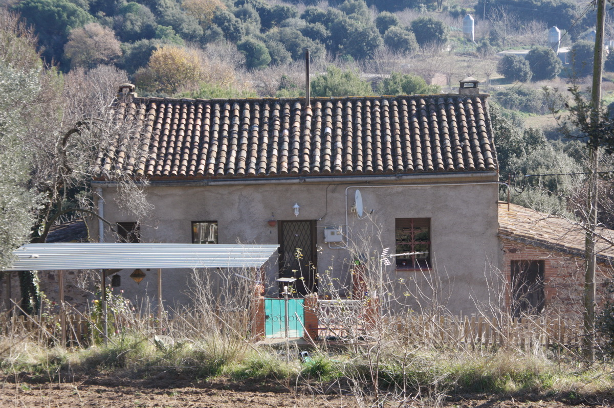 Can Piler (Bigues i Riells, Vallès Oriental)